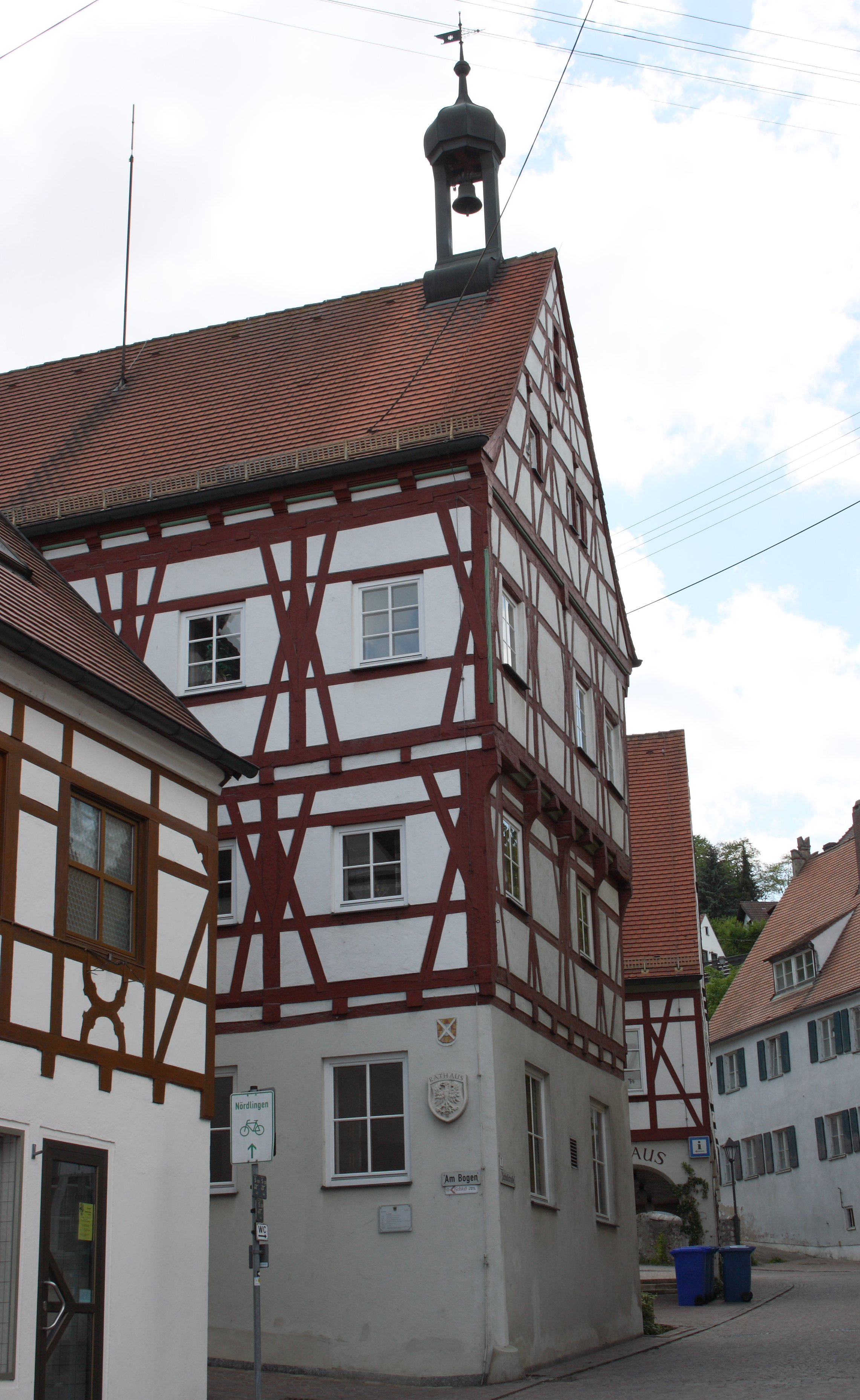 Rathaus in Harburg im Landkreis Donau-Ries (Bayern), Schloßstraße 1